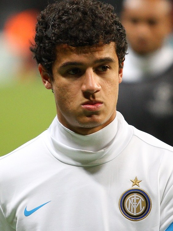 Coutinho prima di CSKA Mosca-Inter del 27-11-2011